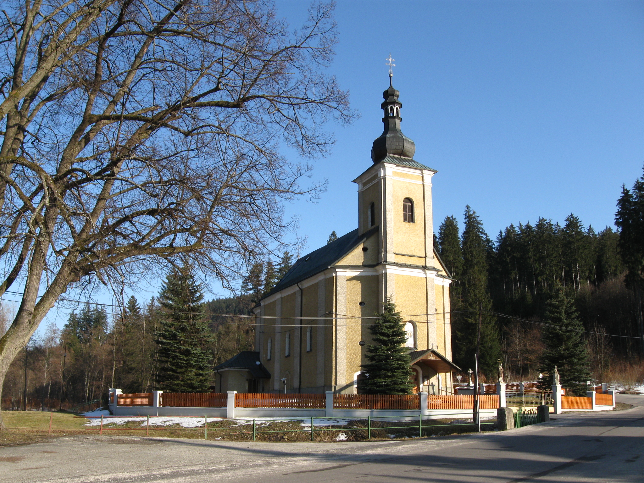 Kostol